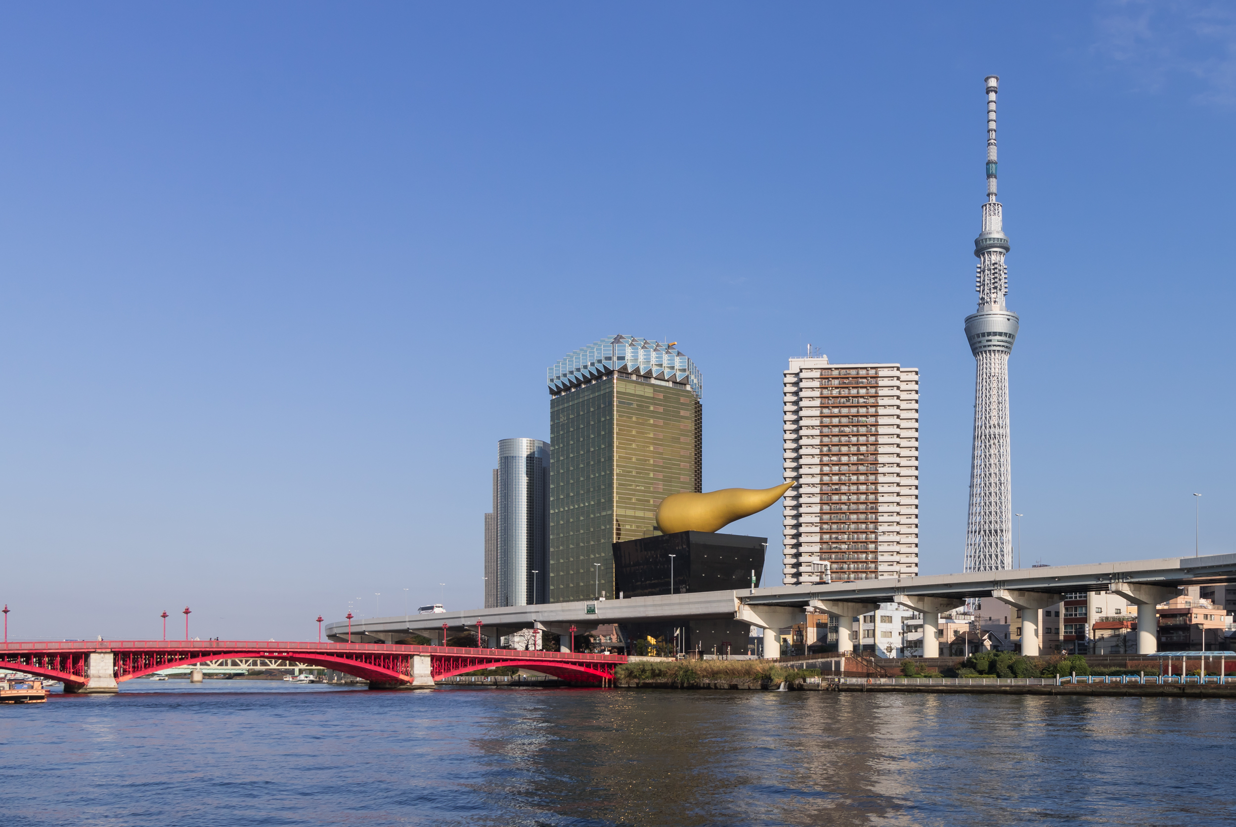 吾妻橋。アサヒビール本社ビル、スカイツリー。